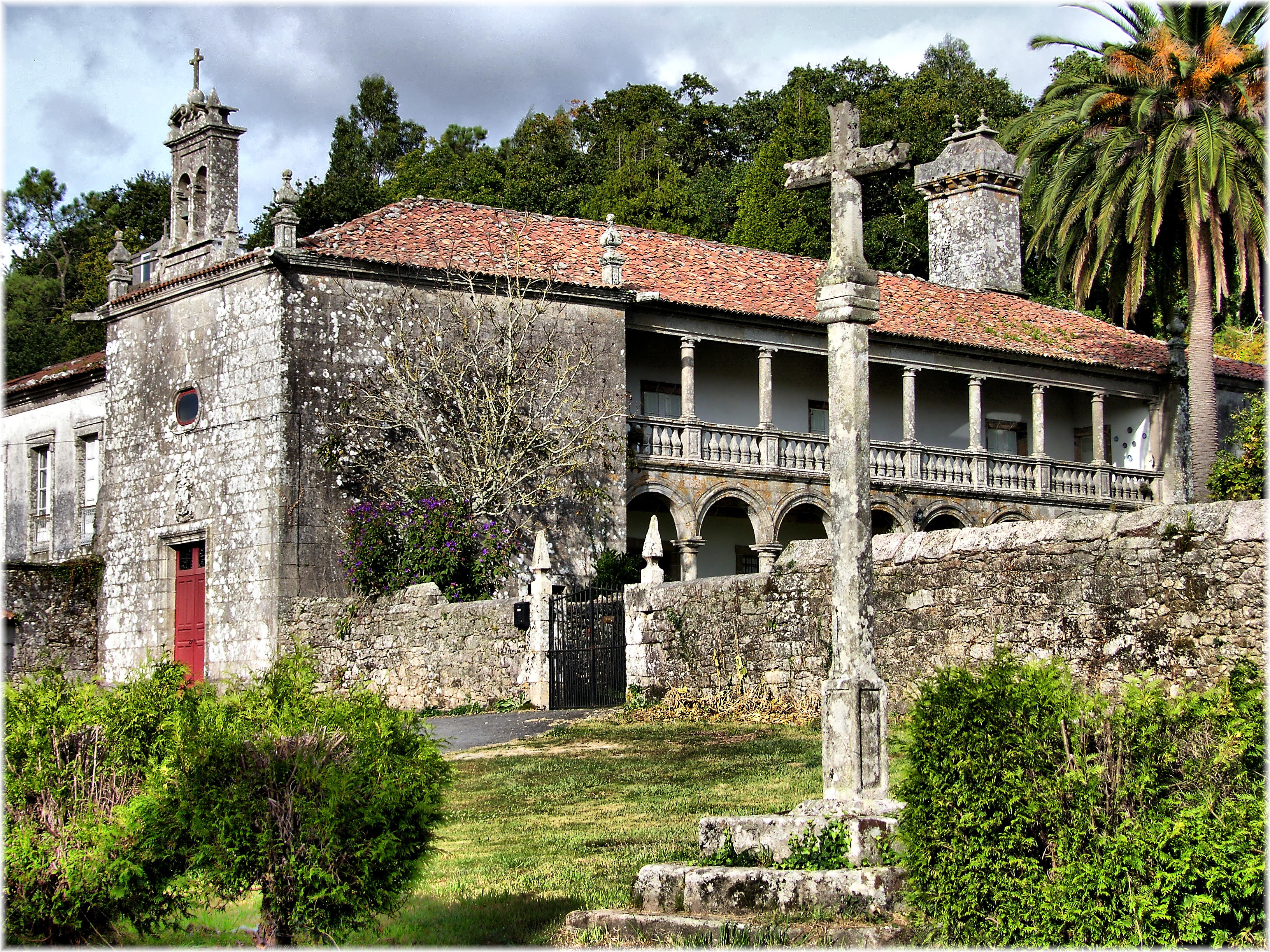 Antonio de Caamaño y Quintana, alcaide de la Casa de Altamira en la segunda mitad del S. XVII, mandó construir la Capilla anexa de la Virgen de la Soledad, y se le atribuye igualmente el resto del Pazo. En el S.XIX perteneció a las familias Ardeleiros y Teixeiro hasta que, en 1880, fue adquirido por D. Andrés Paz Fernández. Forma un conjunto de gran atractivo y especial armonía, con elementos aparentemente dispares que, sin embargo, ofrecen la sugestiva realidad de determinados momentos fuertemente impregnados de cierto sabor romántico, ya históricos. Así, mientras unas palmeras caracterizan inequívocamente el "gusto indiano" típico de los emigrantes con fortuna del S. XIX, unas características chimeneas nos hablan con una elocuencia arquitectónica poco frecuente del poder económico y social de sus habitantes, a quienes resulta innegable el acierto del conjunto y particularmente, la arquería con arcos de medio punto y capiteles neo-dóricos, que soporta una solaina o galería balconada con capiteles neo-jónicos en un conjunto de clara inspiración claustral, propio del renacimiento tardío, característico en la Galicia del S. XVII.